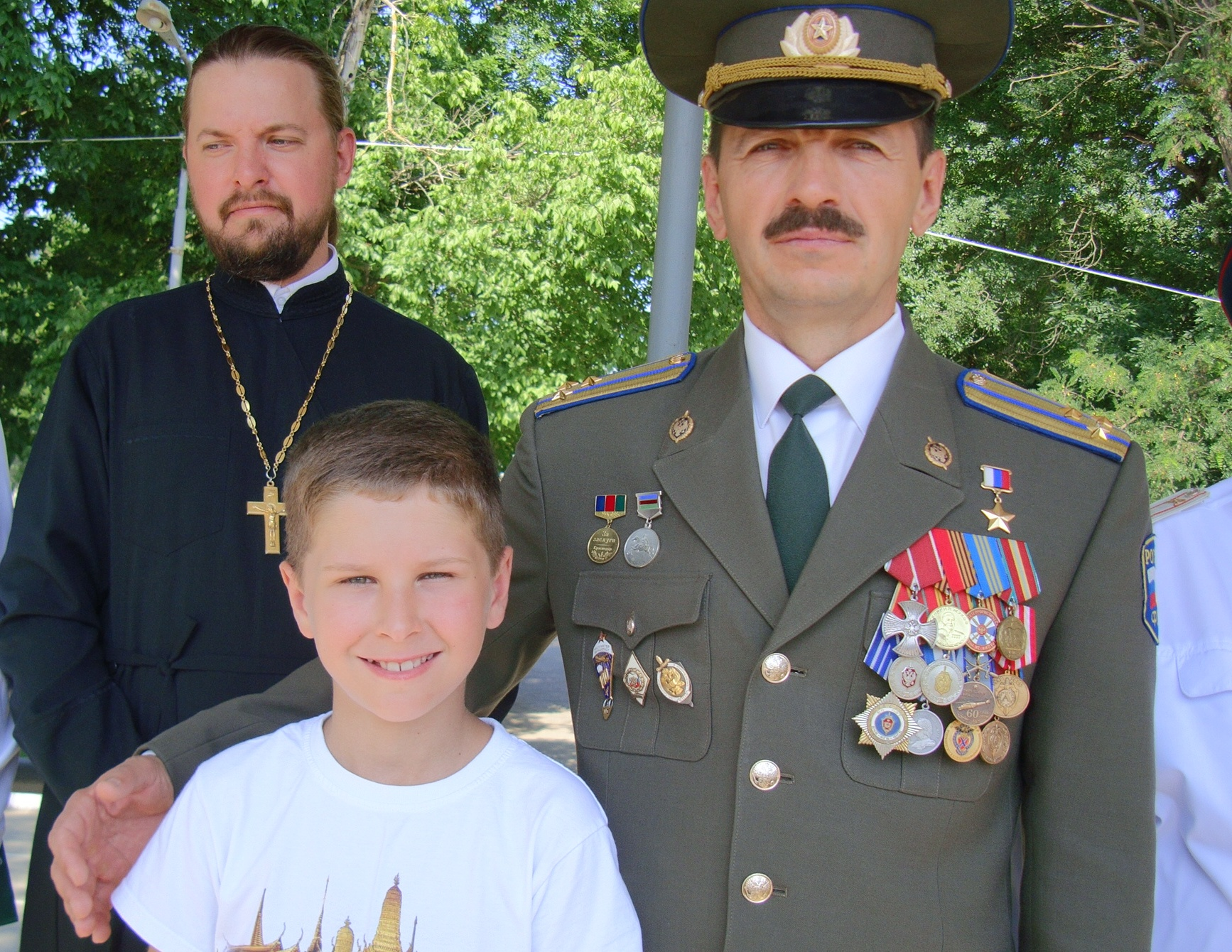 Шендрик Евгений Демьянович Герой России